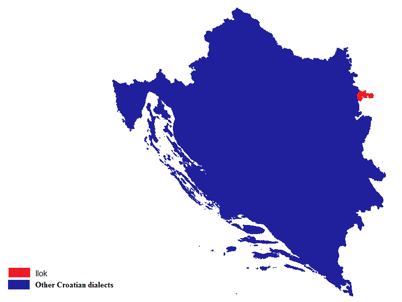 Iločki dijalekt